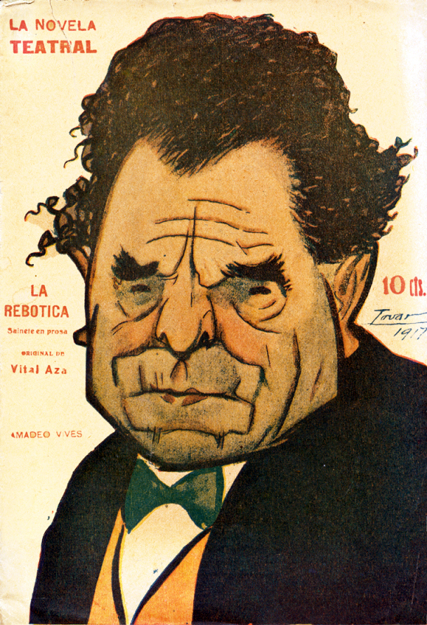 Caricatura de Amadeo Vives.